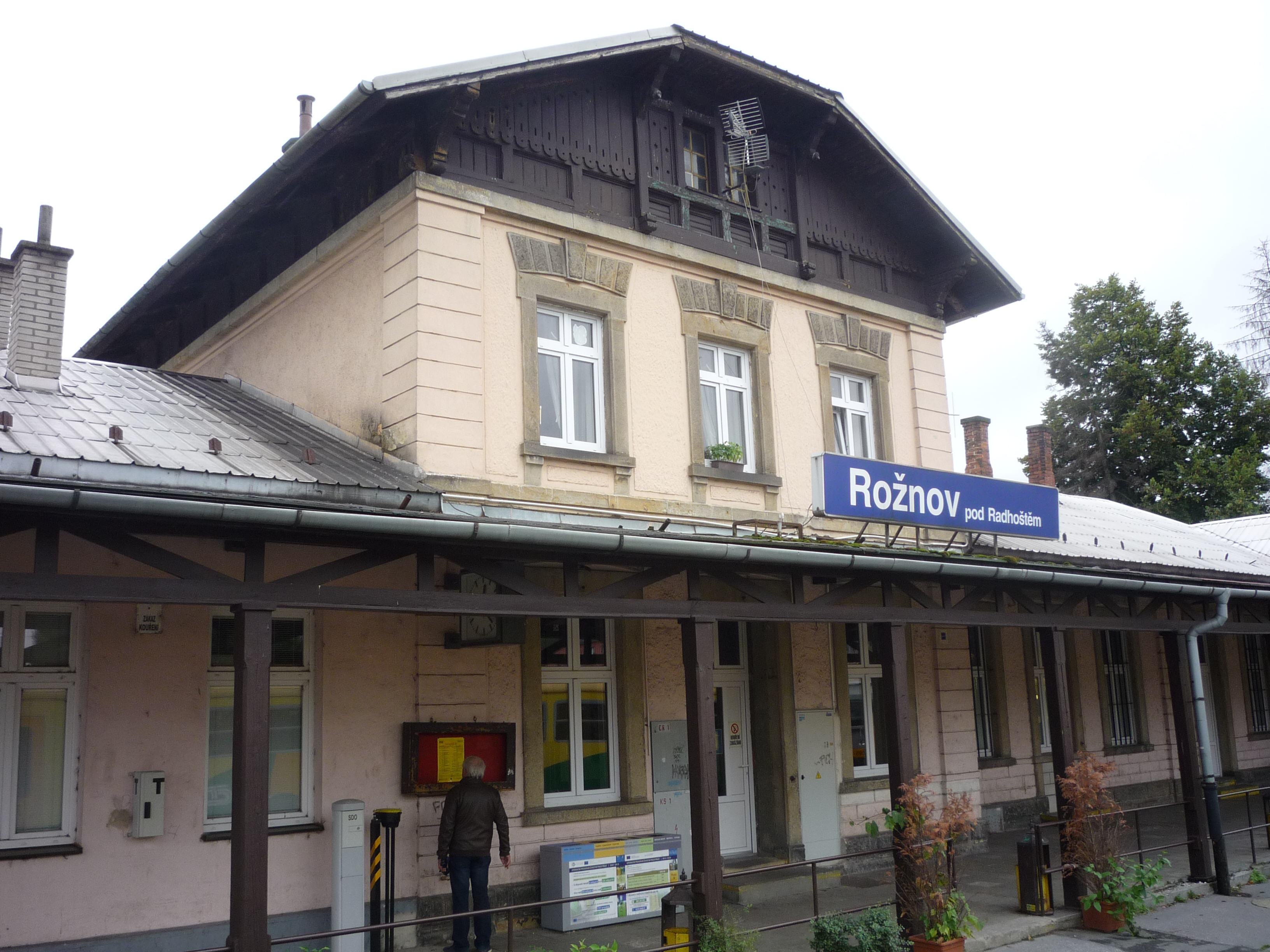 Autor fotografie Jiří Zelenka. Železniční stanice Rožnov pod Radhoštěm.Rožnov pod Radhoštěm. Okres Vsetín. Kraj Zlínský. Czech Republic.